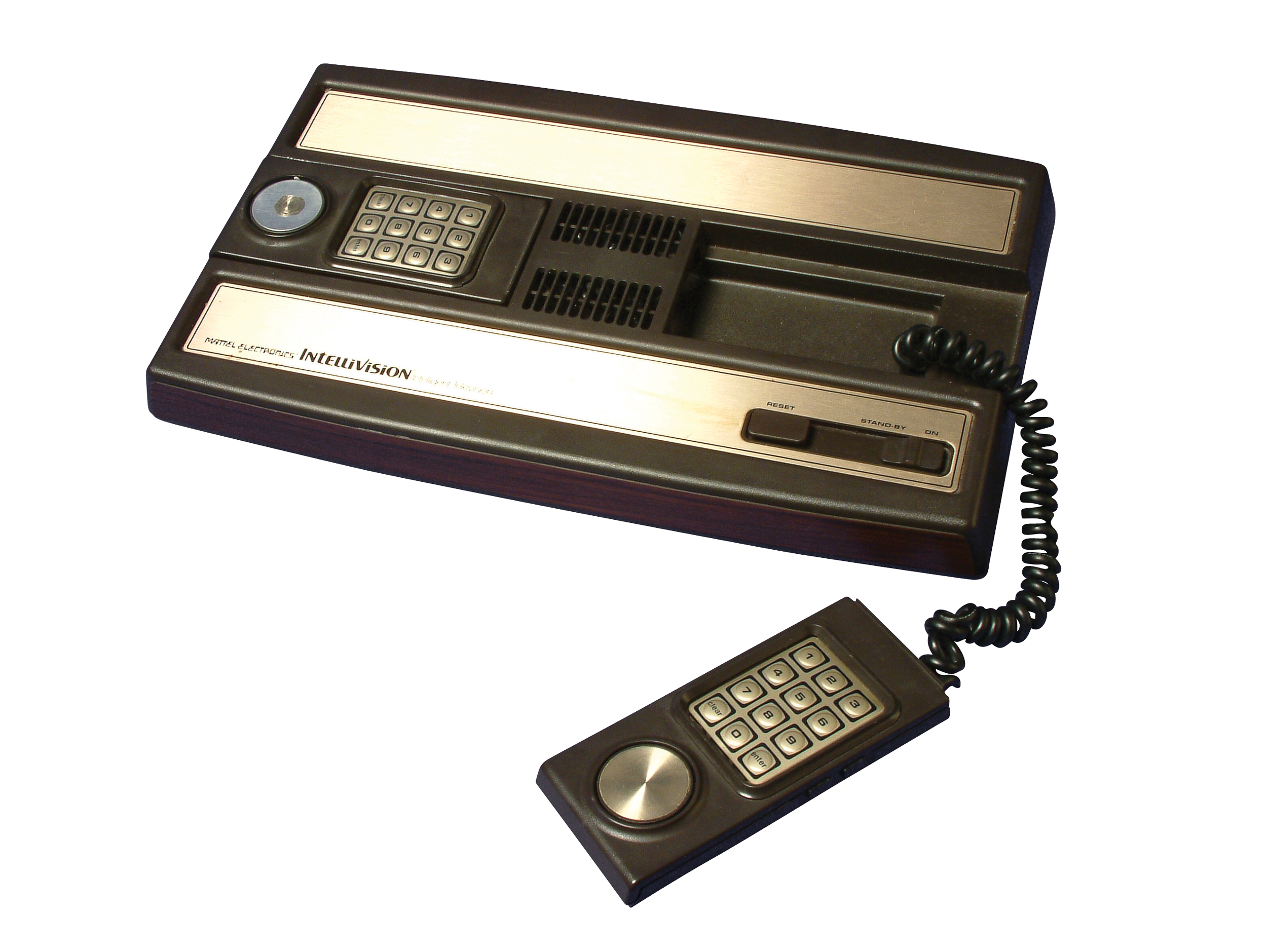 computerspielemuseum-12